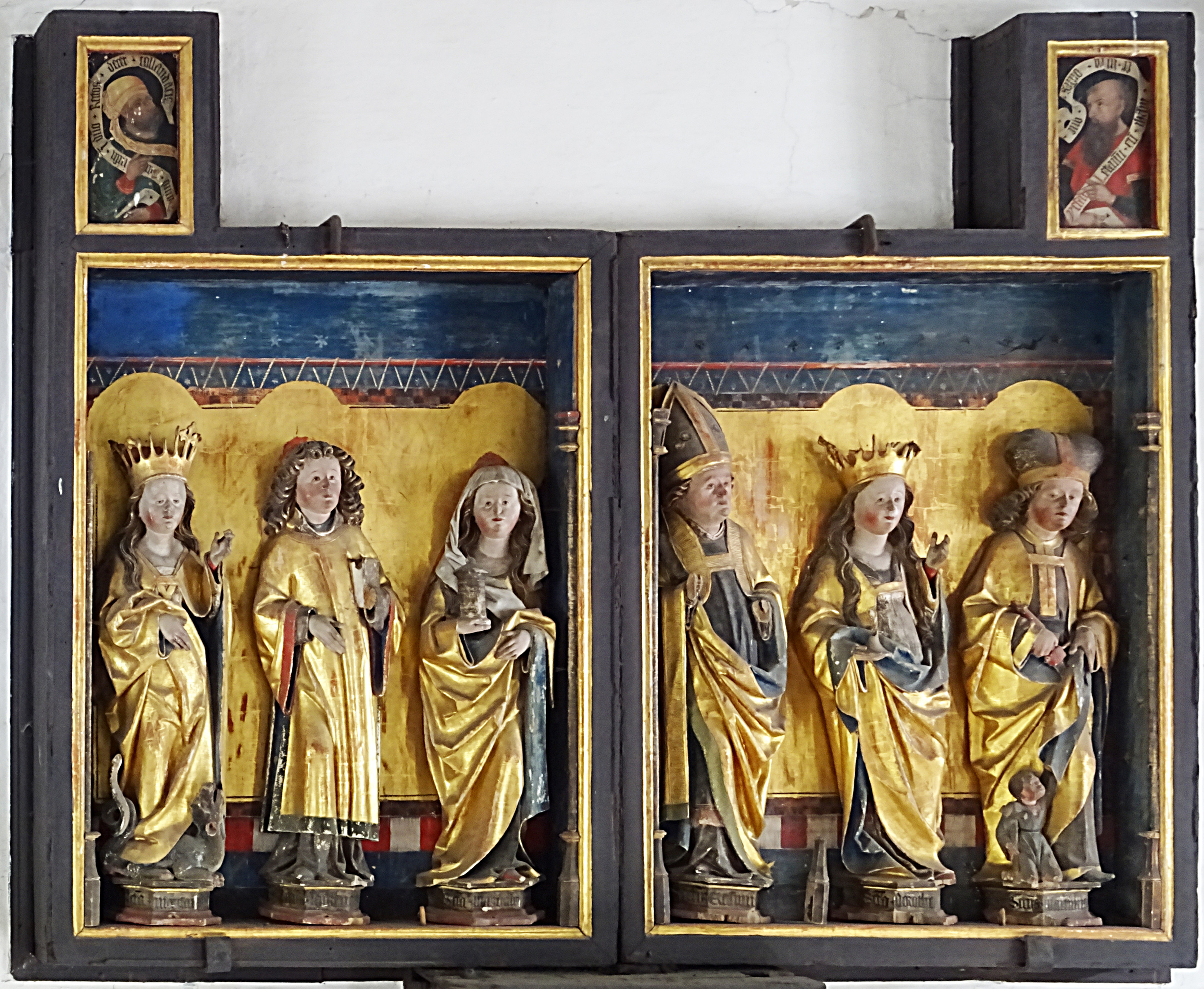 Vierflügeliger Schnitzaltar von 1504 aus Saalfelder Schule in der Dorfkirche Ammerbach. Vorderseite linker Seitenflügel, von außen: St. Margareta (Drachen), St. Laurentius (hier mit Buch), St. Maria Magdalena (Salbenbüchse); Vorderseite rechter Seitenflügel, von innen: St. Erasmus, St. Dorothea, St. Martin (Mantel). In der Ecküberhöhung links König David, rechts der Prophet Jesaja.